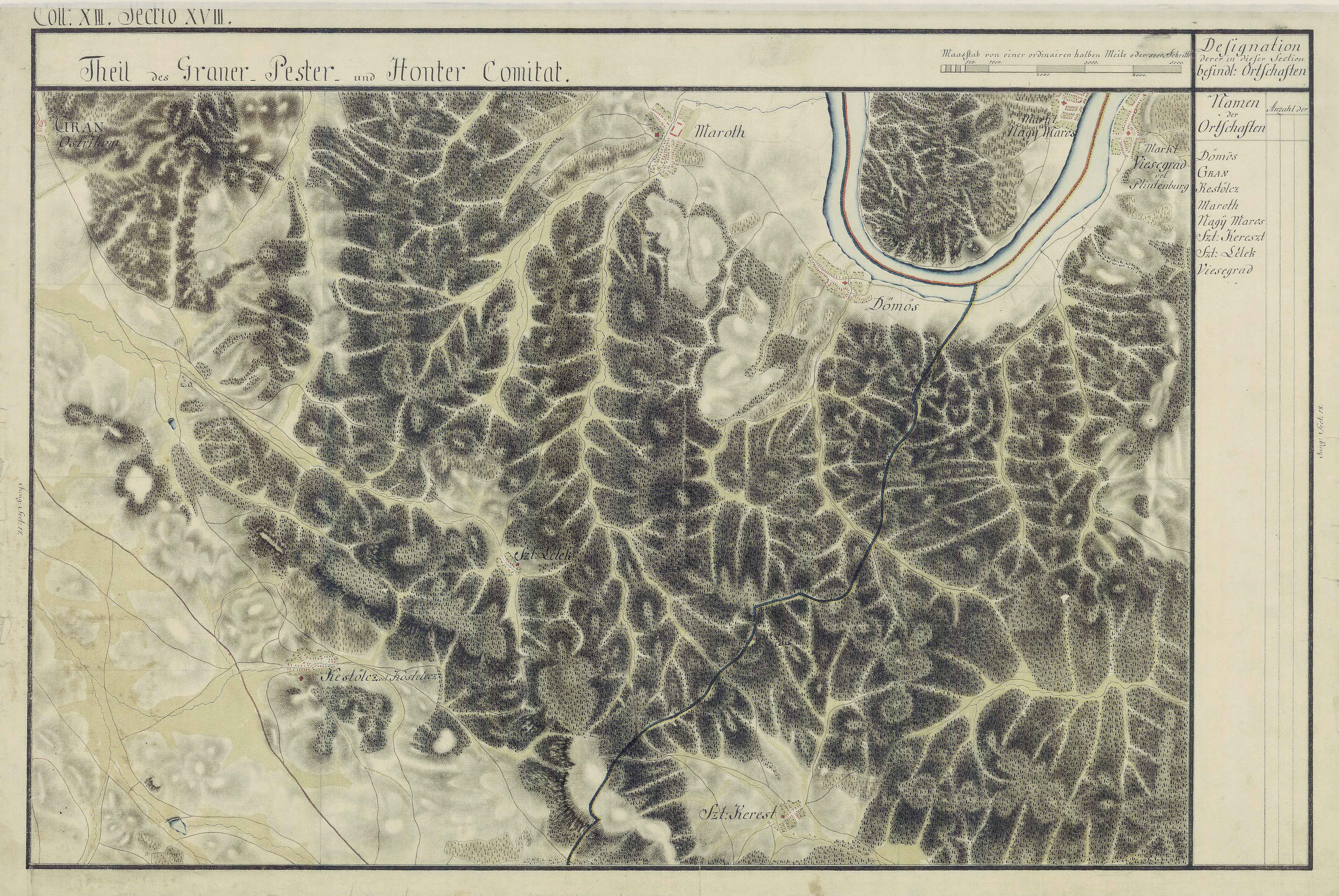 Comitatul Honter în Harta Iosefină a Regatului Ungariei pg.13-18, 1782-85.